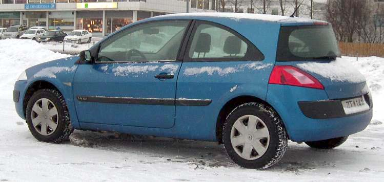 Renault Mégane